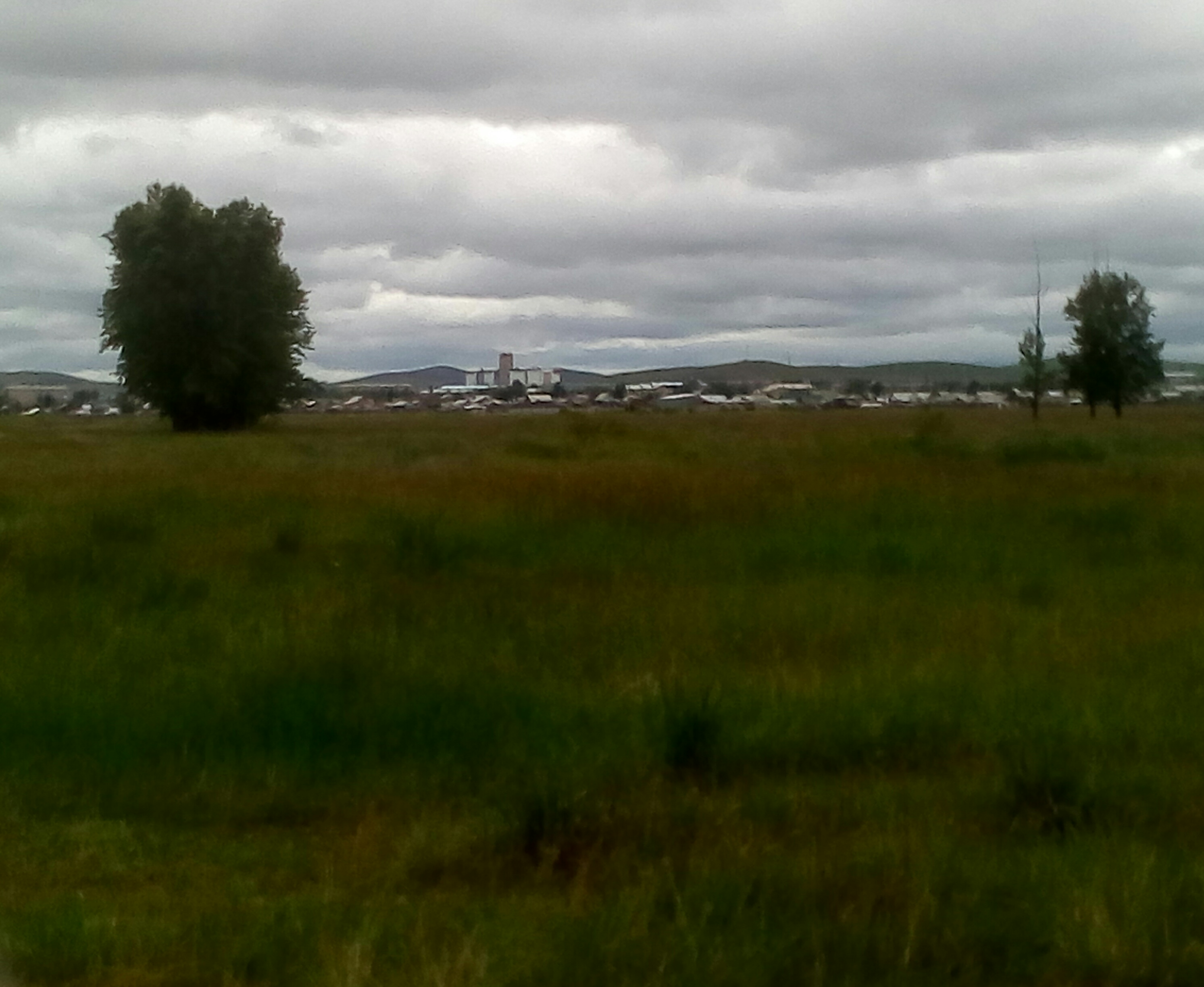 Вид на город Борзя со стороны реки Борзя.